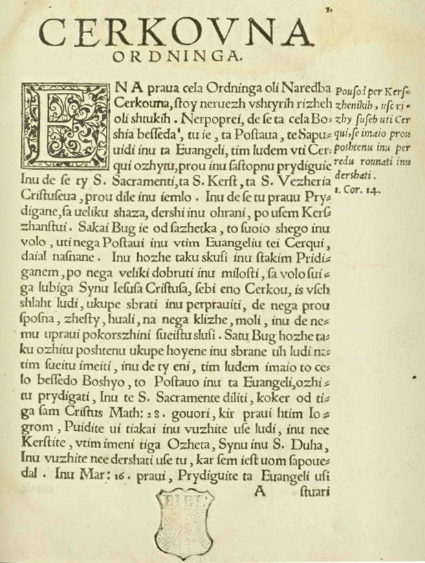 Cerkovna ordninga.